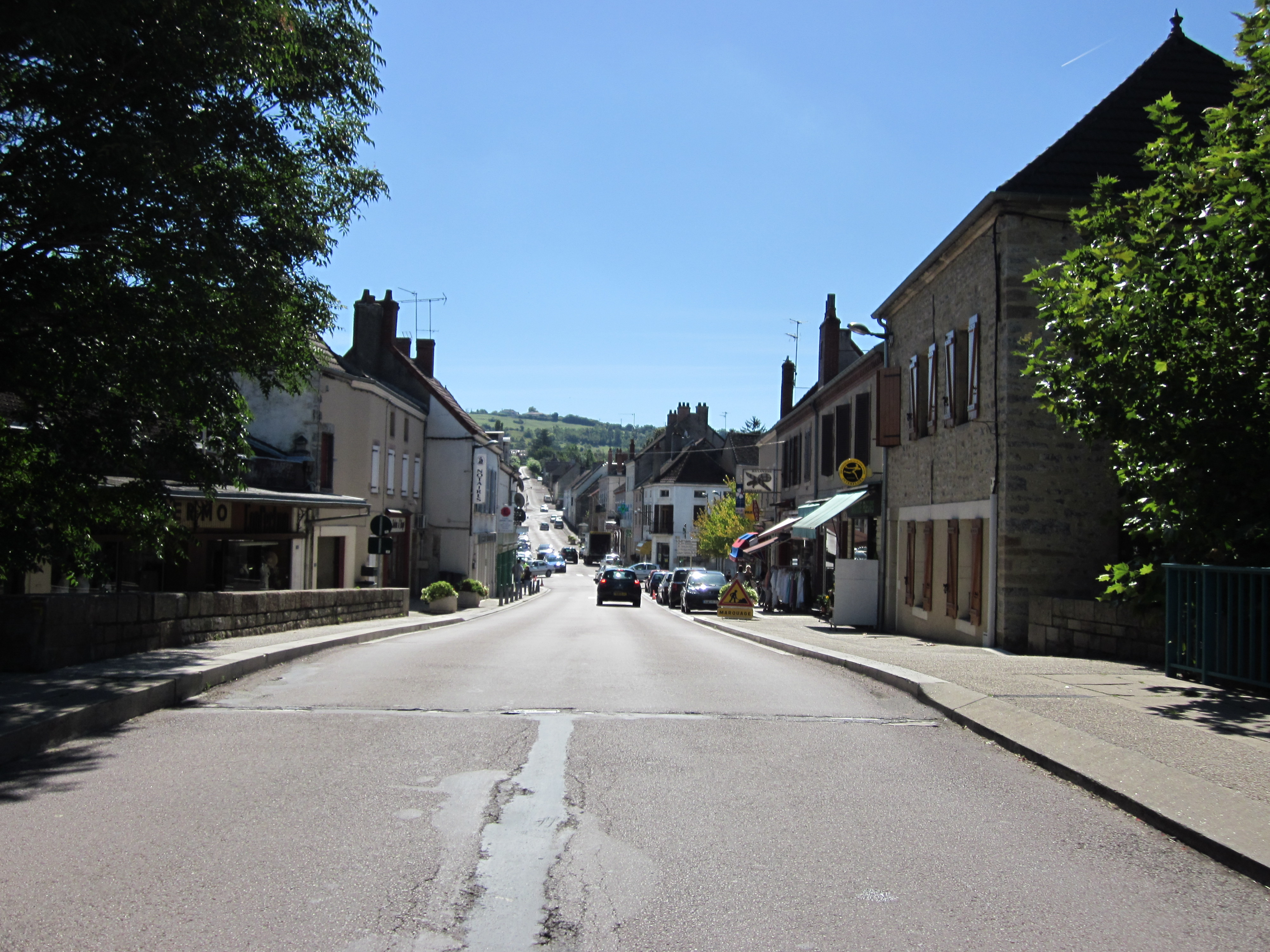 Saint-Léger-sur-Dheune - rue principale (D 978 Autun - Couches // Mercurey - Chalon-sur-Saône)